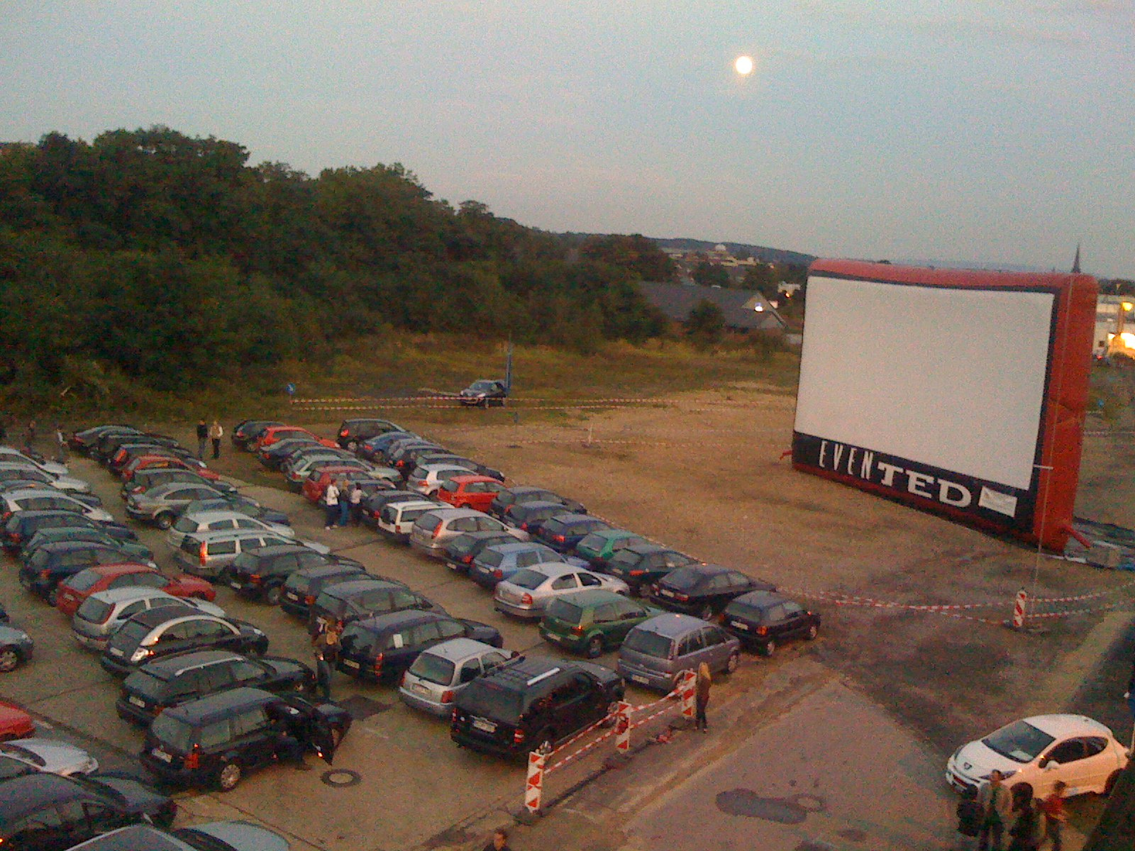 mobiles Autokino test in Hückelhoven - Leinwand 16x8 m - Grube Sophia-Jacoba